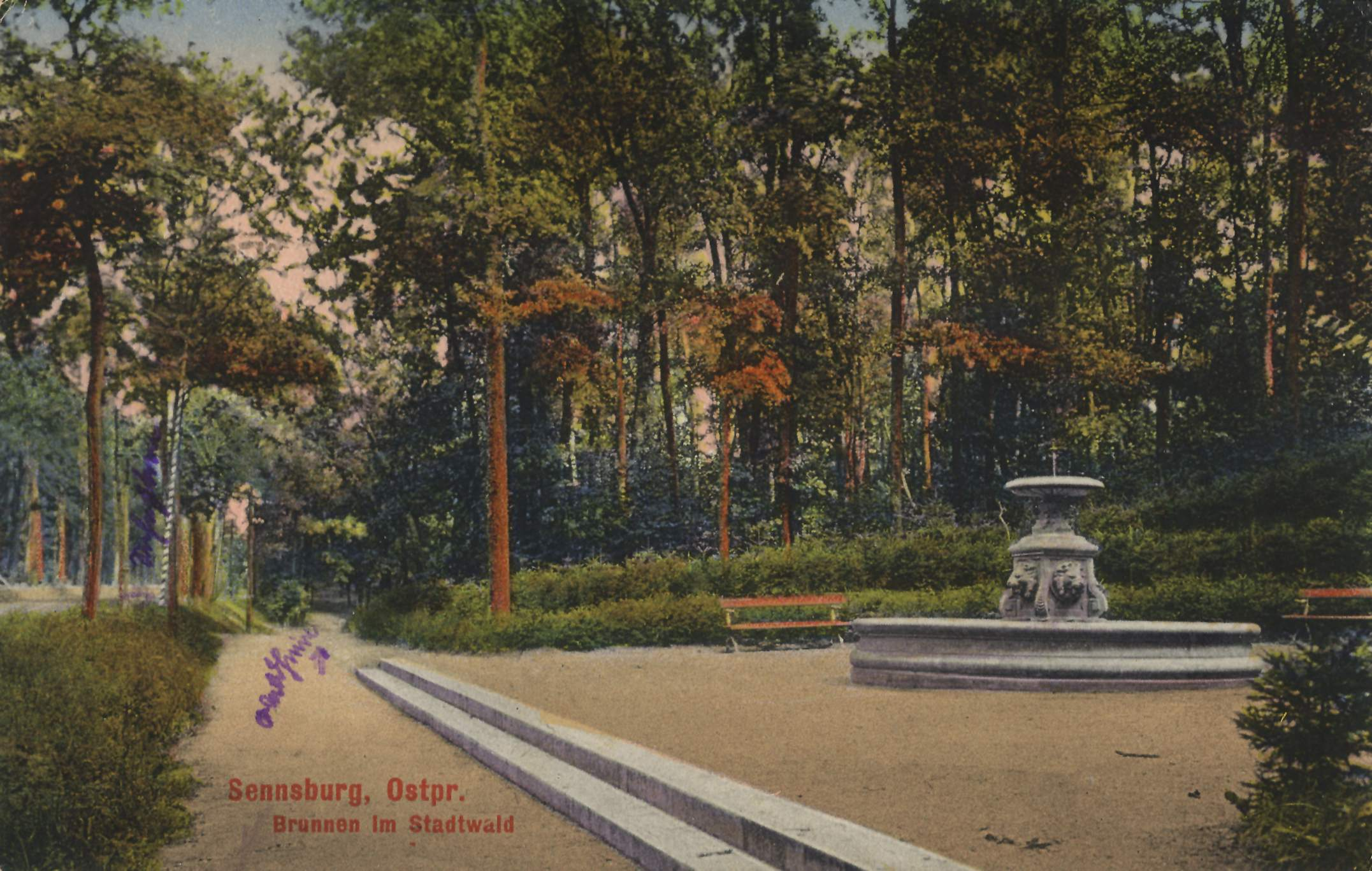 Brunnen im Stadtwald